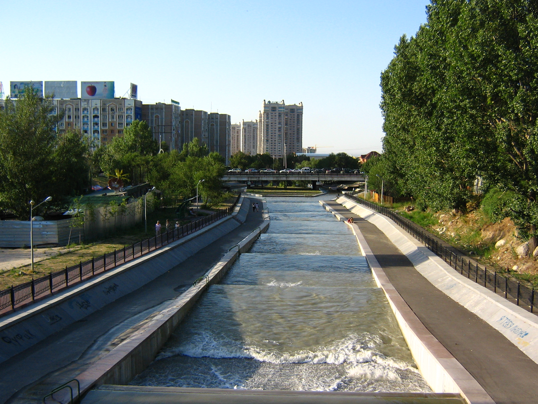 Алматинка